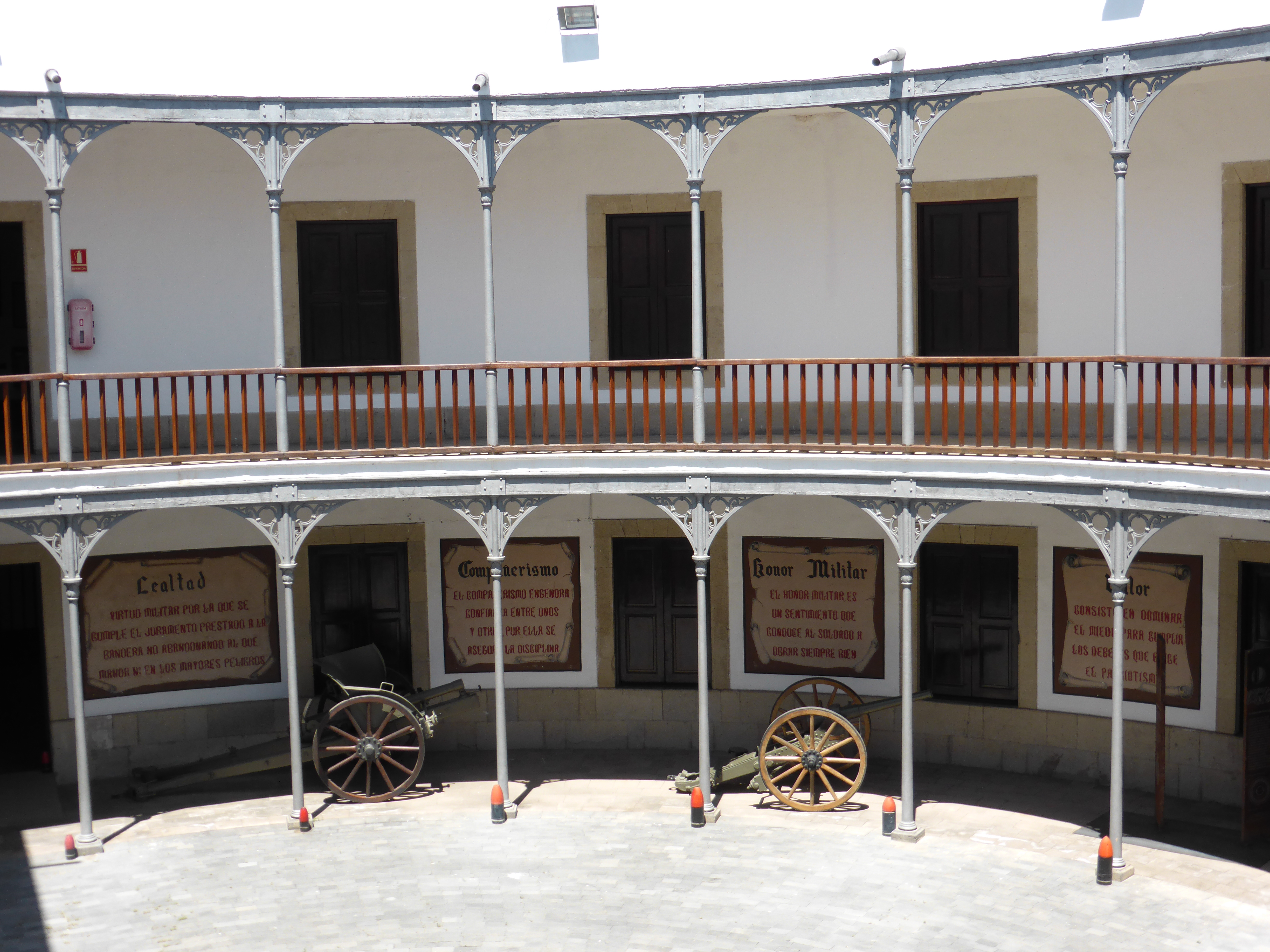 En el siglo XIX se construyó el Fuerte de Almeyda (o Almeida), en la ciudad de Santa Cruz de Tenerife. Actualmente es sede del "Museo Histórico Militar de Canarias".